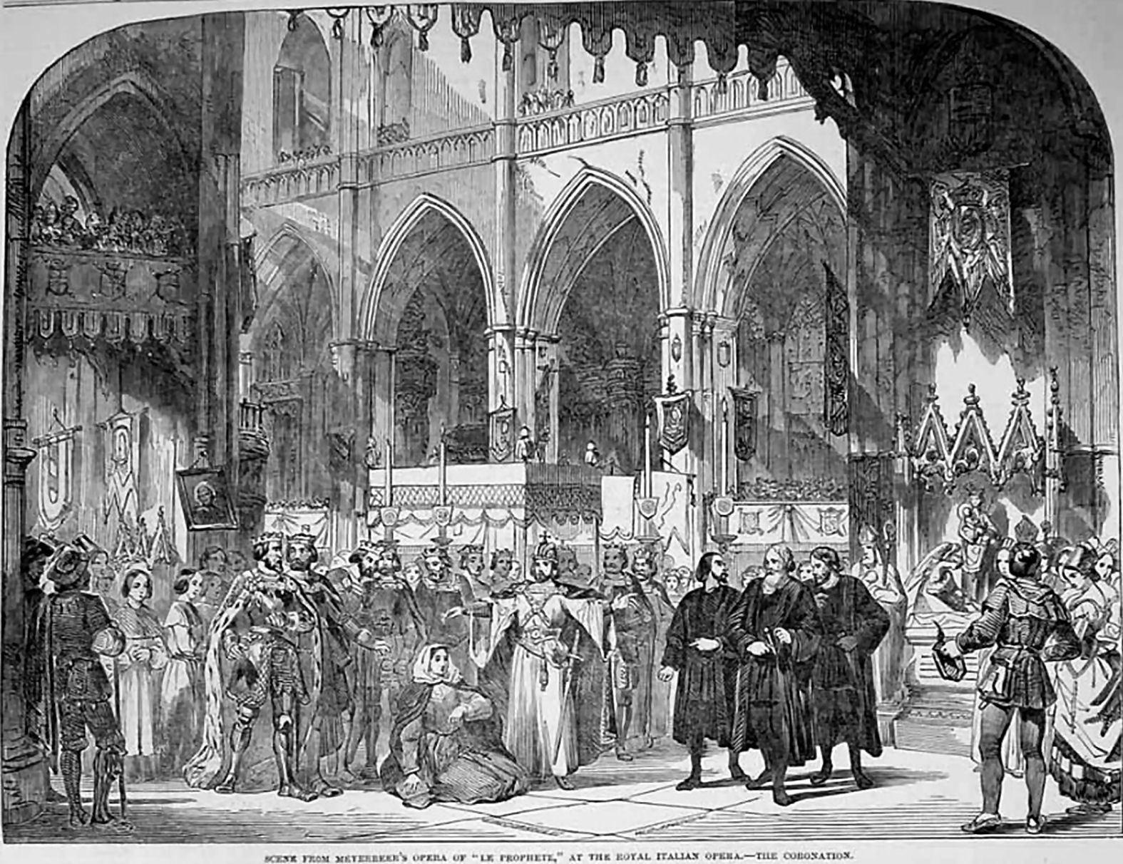 Le Prophète : illustration de presse de la scène du couronnement lors de la création londonienne de l'oeuvre au Royal Italian Opera (1849)